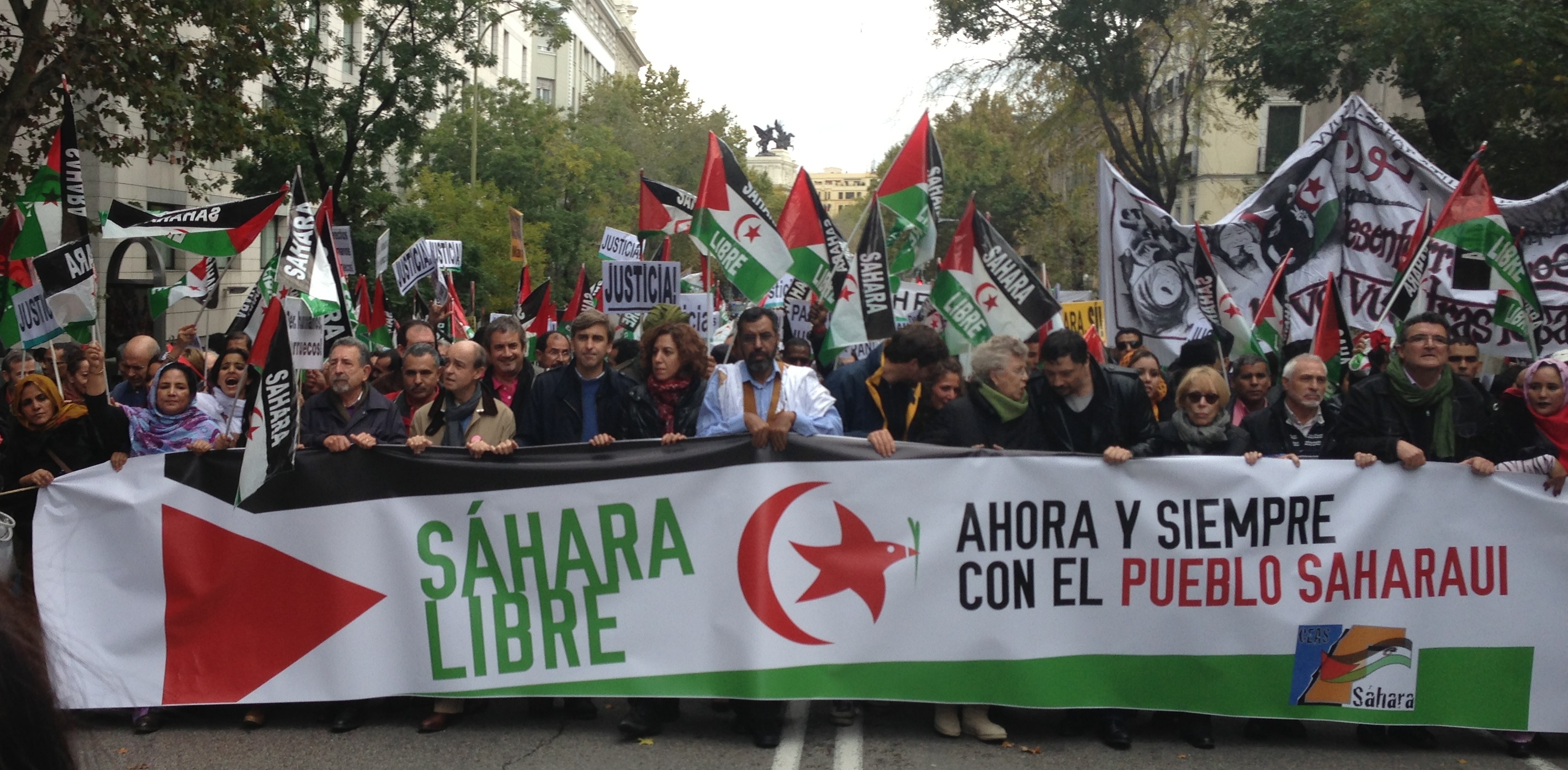 Manifestación Madrid noviembre 2012